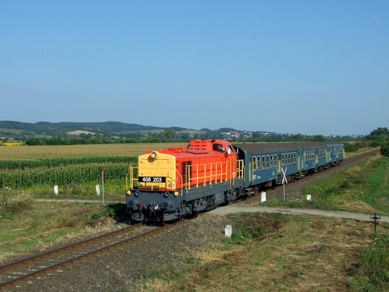 A Győr-Siófok viszonylatú fürdősvonat élén a 203-as